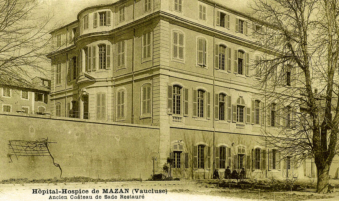 Ancien château des Sade à Mazan devenu un hospice au début du XXe siècle